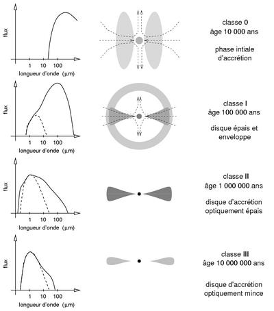 Scénario de formation des étoiles de type solaire proposé par Ph. André en 1994. Auteur sous sa forme actuelle : Régis Lachaume. Schéma original : Philippe André (Observations of protostars and protostellar stages in The cold Universe, 1994).